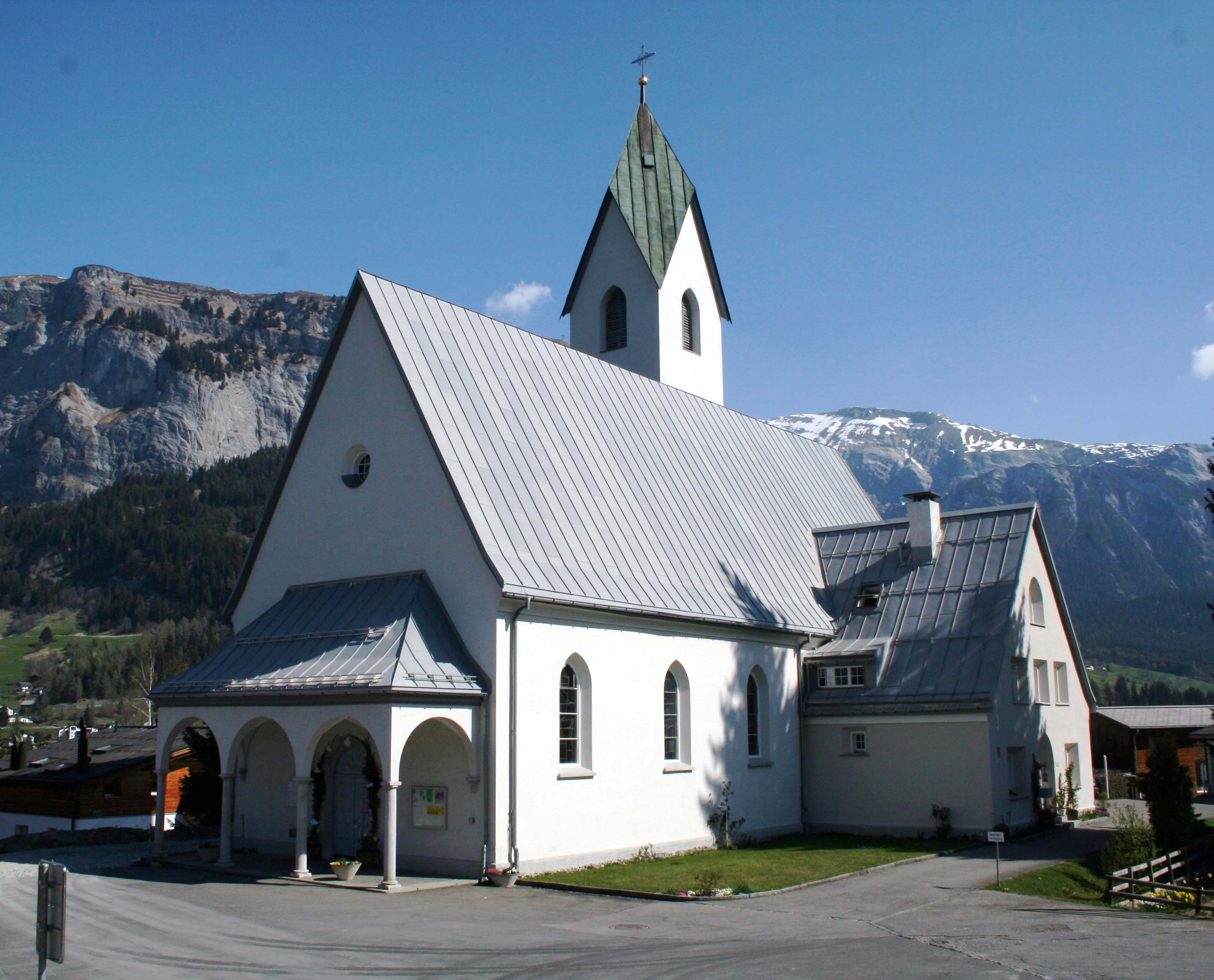 kath. Kirche Flims